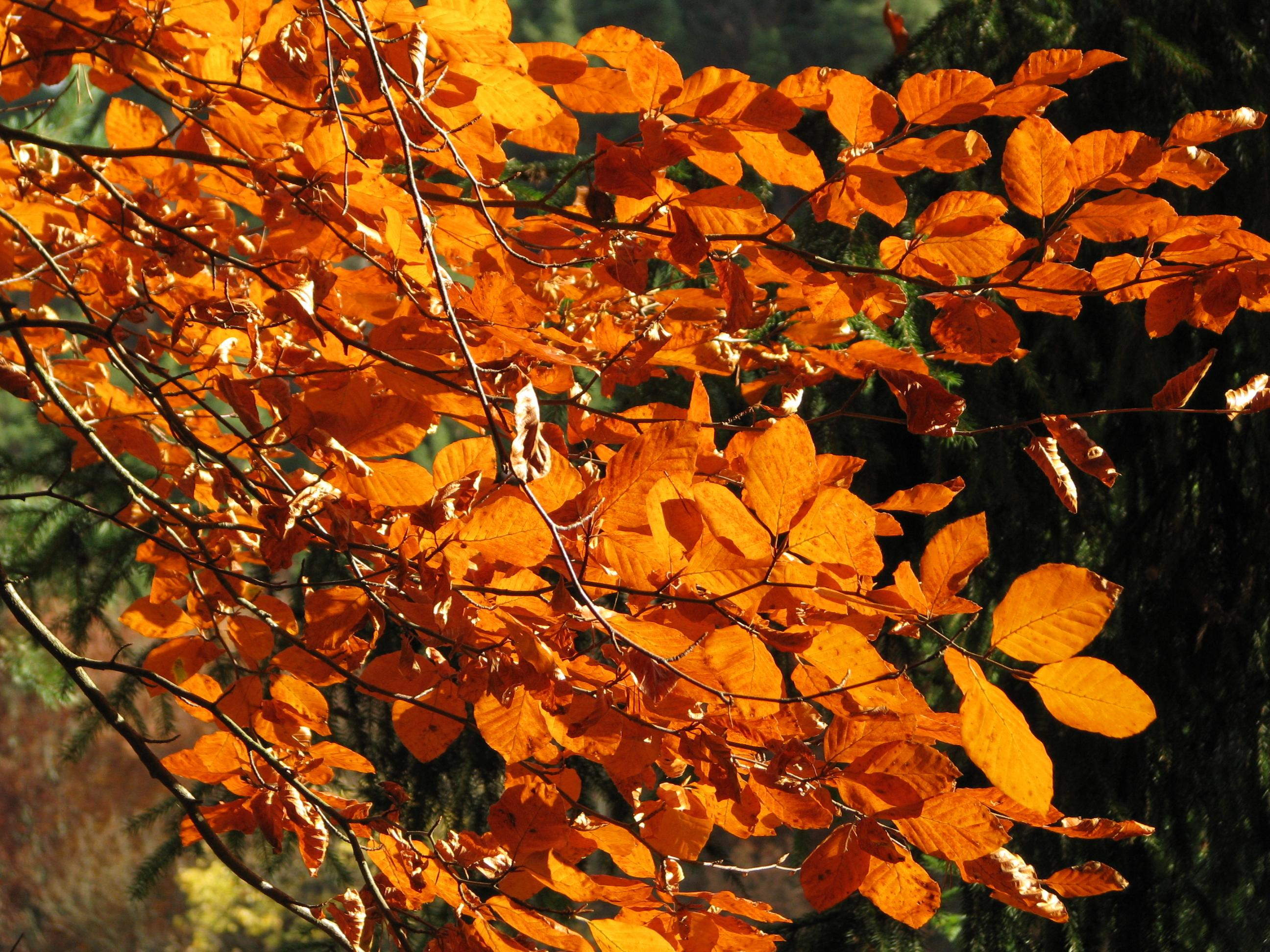 Herbstverfärbung an Rotbuche im Reichenbachtal bei Plaue (Ilmkreis).